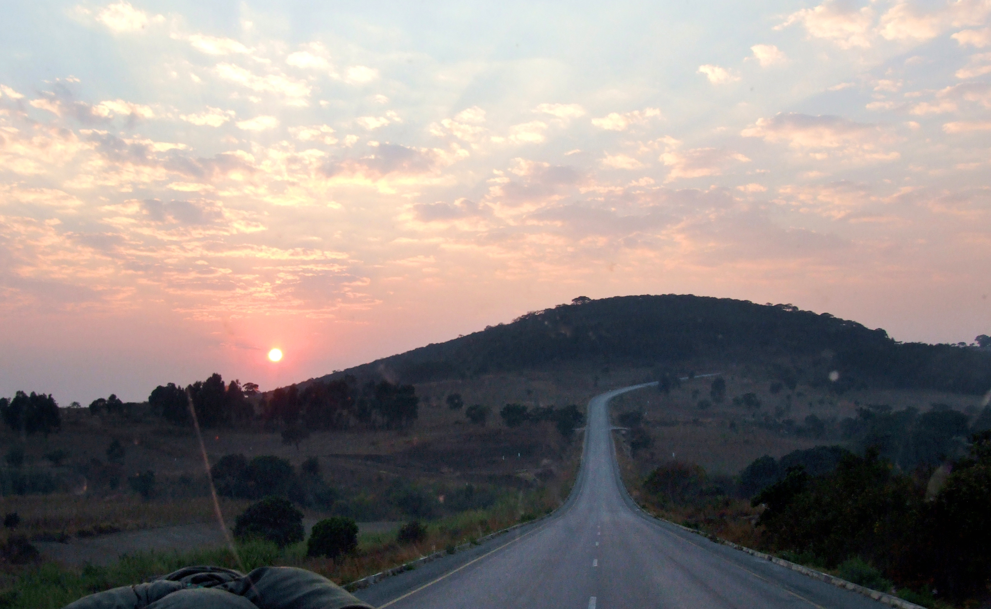 Road outside Mbeya, Tanzania